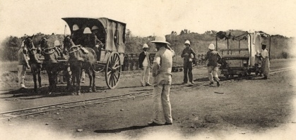 Diego Suarez - Voiture Postale - Station de Sakaramy